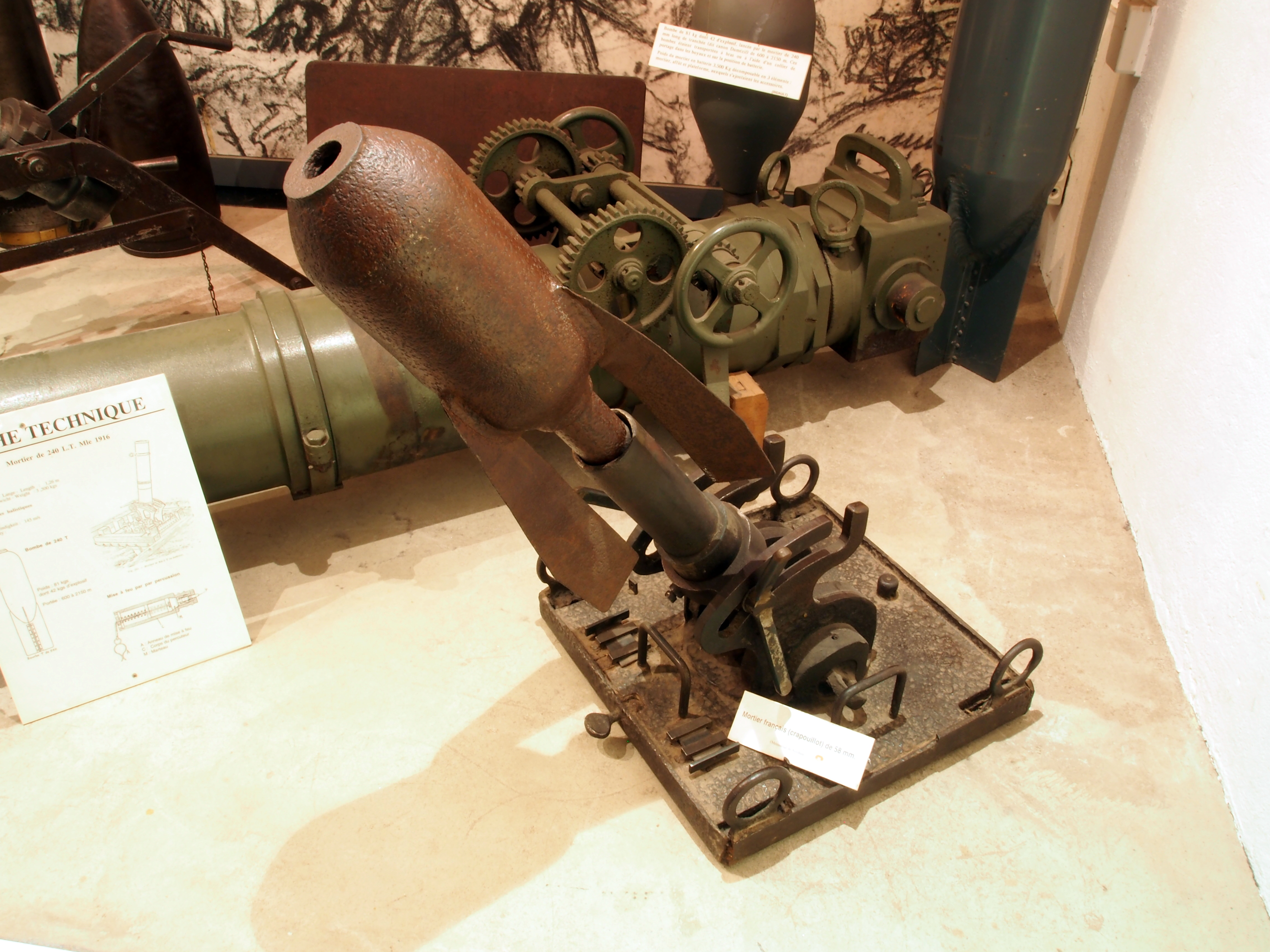 Mortier francais (crapouillot) de 58mm.